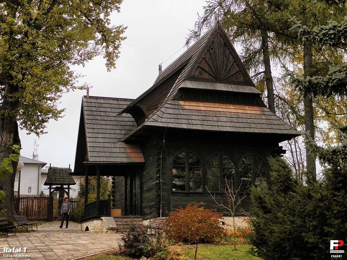 Dawna pracownia Stefana Żeromskiego, obecnie muzeum.